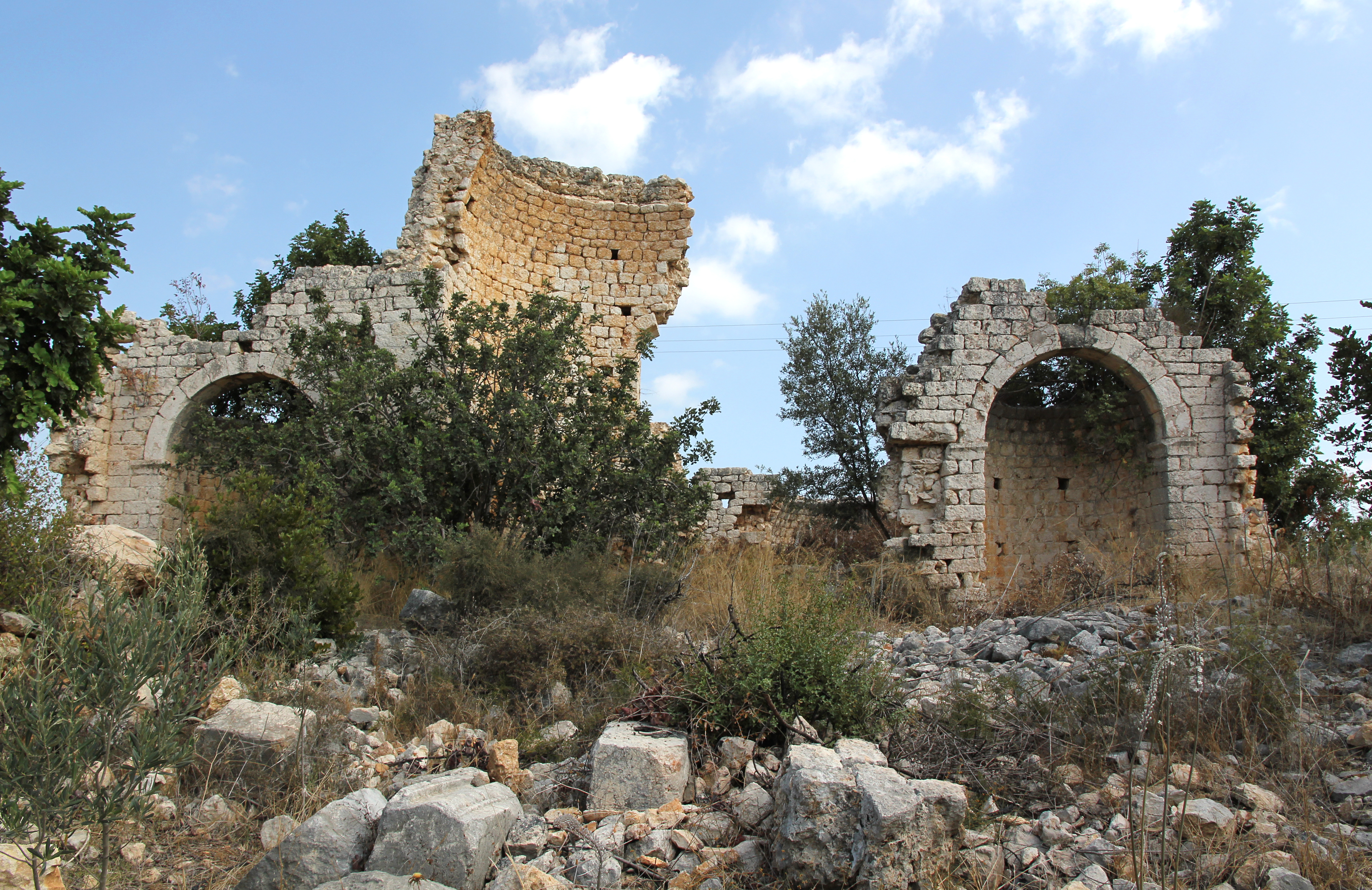 Korykos, archäologischer Fundort in der Südtürkei, Große armenische Kirche